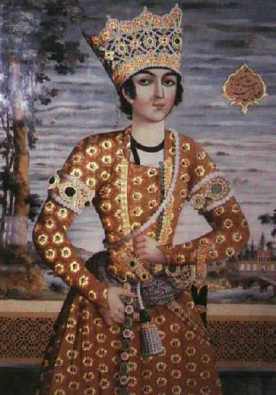 Iranian Prince Abbas Mirza Farman Farmaian